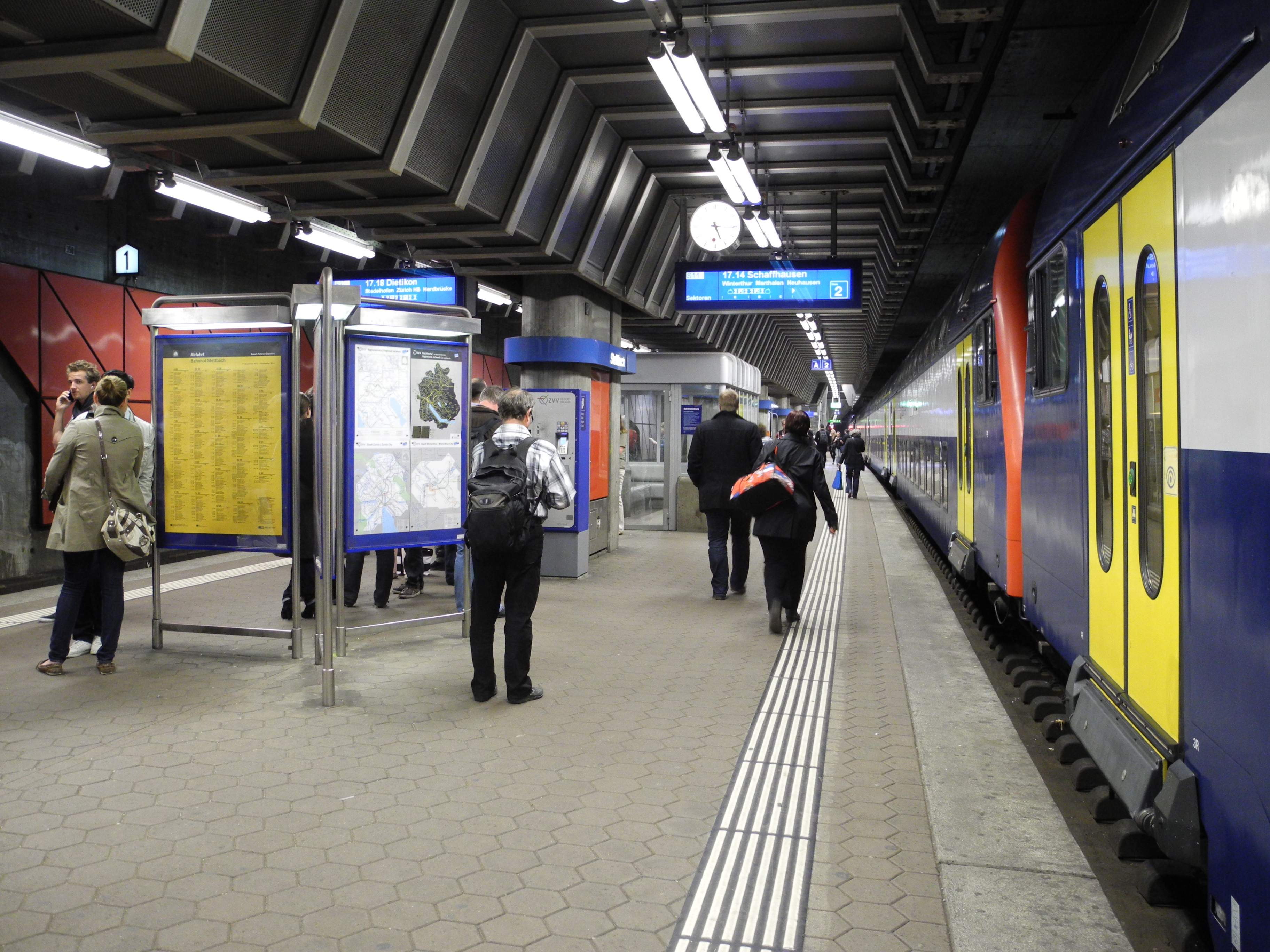 Bahnhof Stettbach in Zürich-Stettbach (Switzerland)